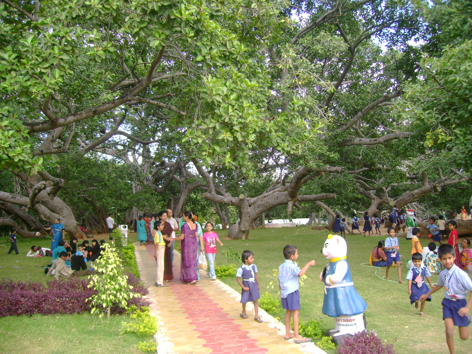 Pillalamarry (700 years old large Banyan Tree) near Mahabubnagar Town in Andhra Pradesh (India).